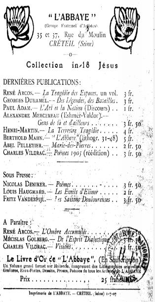 Programme prévisionnel éditorial de L'Abbaye imprimé à Créteil le 1er juillet 1907 dans les Cahiers mensuels de Mécislas Golberg.